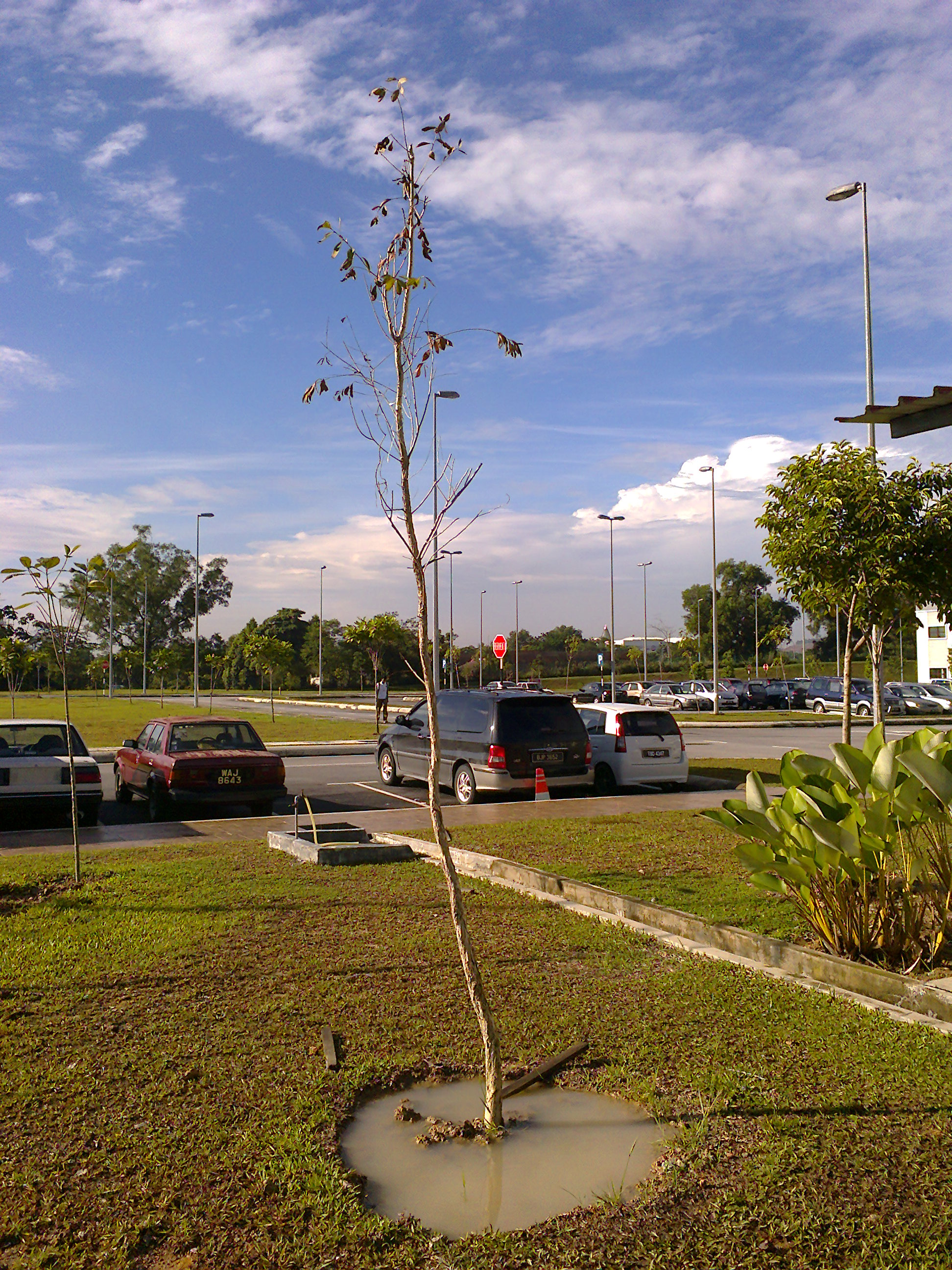 Pokok yang mula mati akibat genang air.